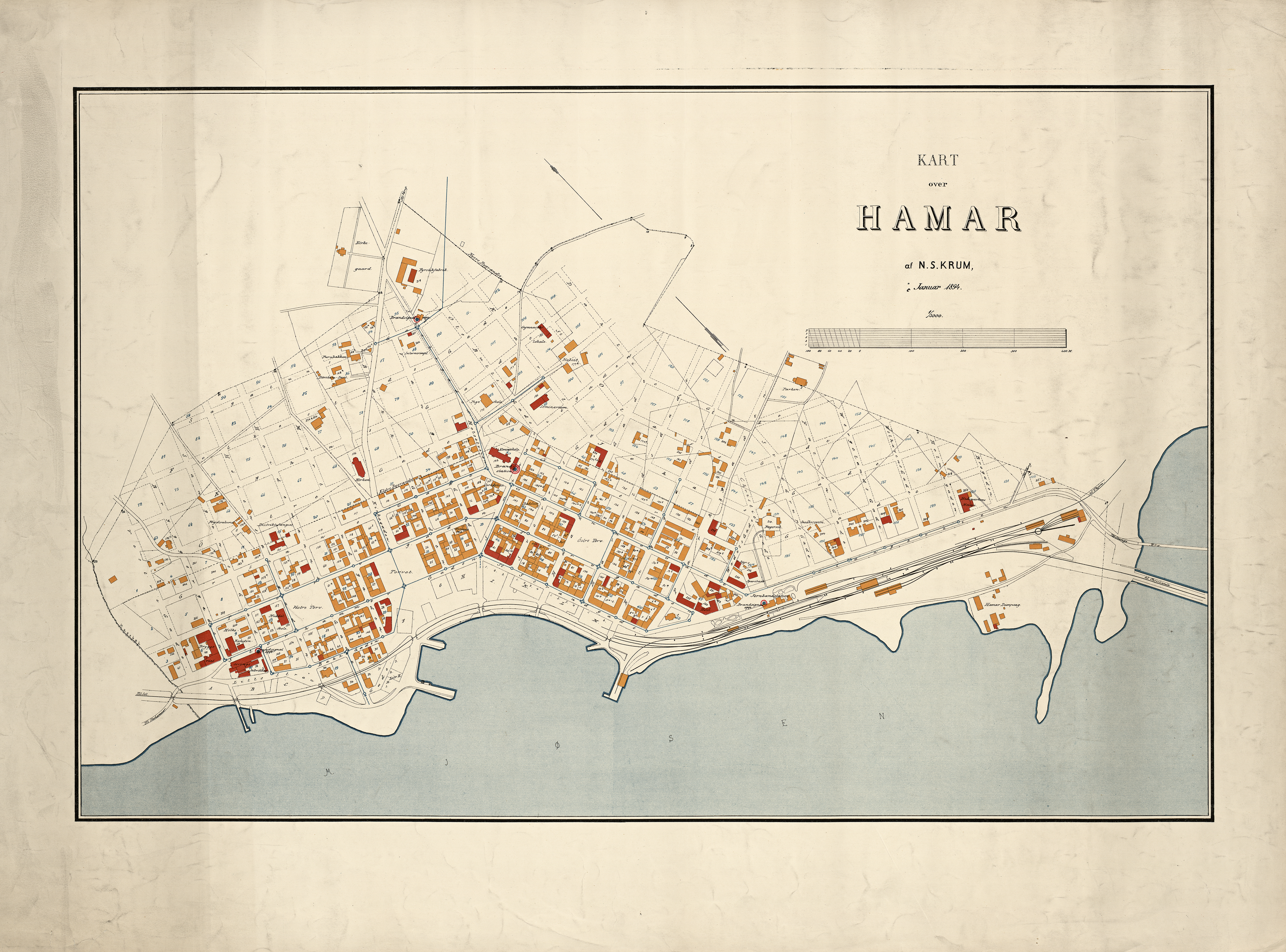 Kart over Hamar (1894)